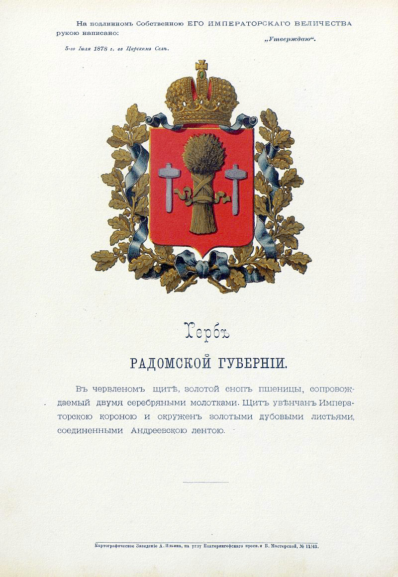 Official Russian Empire coat of arms Radom Governorate. Герб Российской Империи Радомской губернии с официальным описанием в Гербовнике Бенке. Утверждён Императором Всероссийским Александром Вторым.